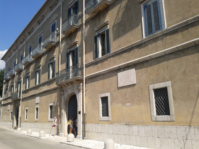 Palazzo Sipari